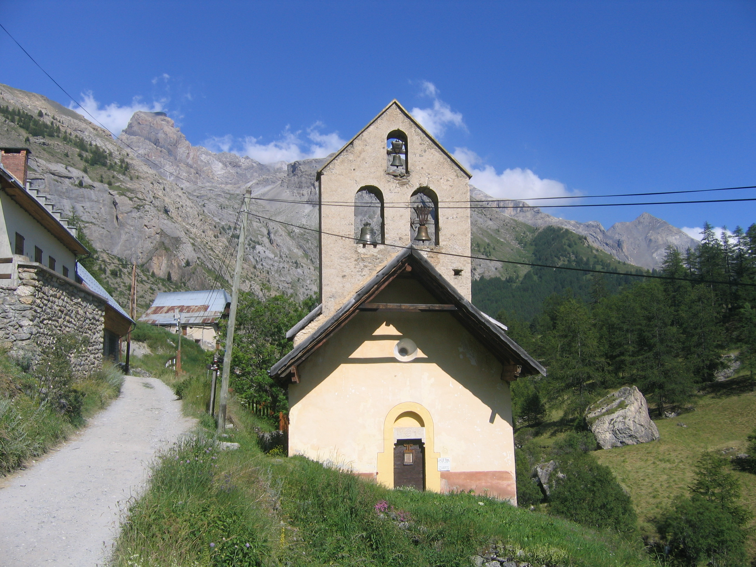 Eglise de Fouillouse